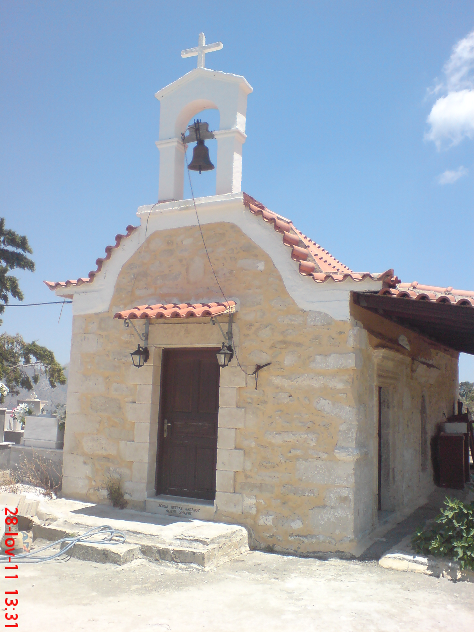 κοιμητηριακός ναός